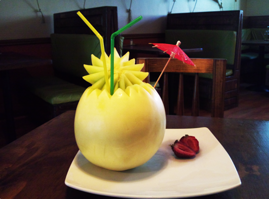 Melón con vino estilizado.